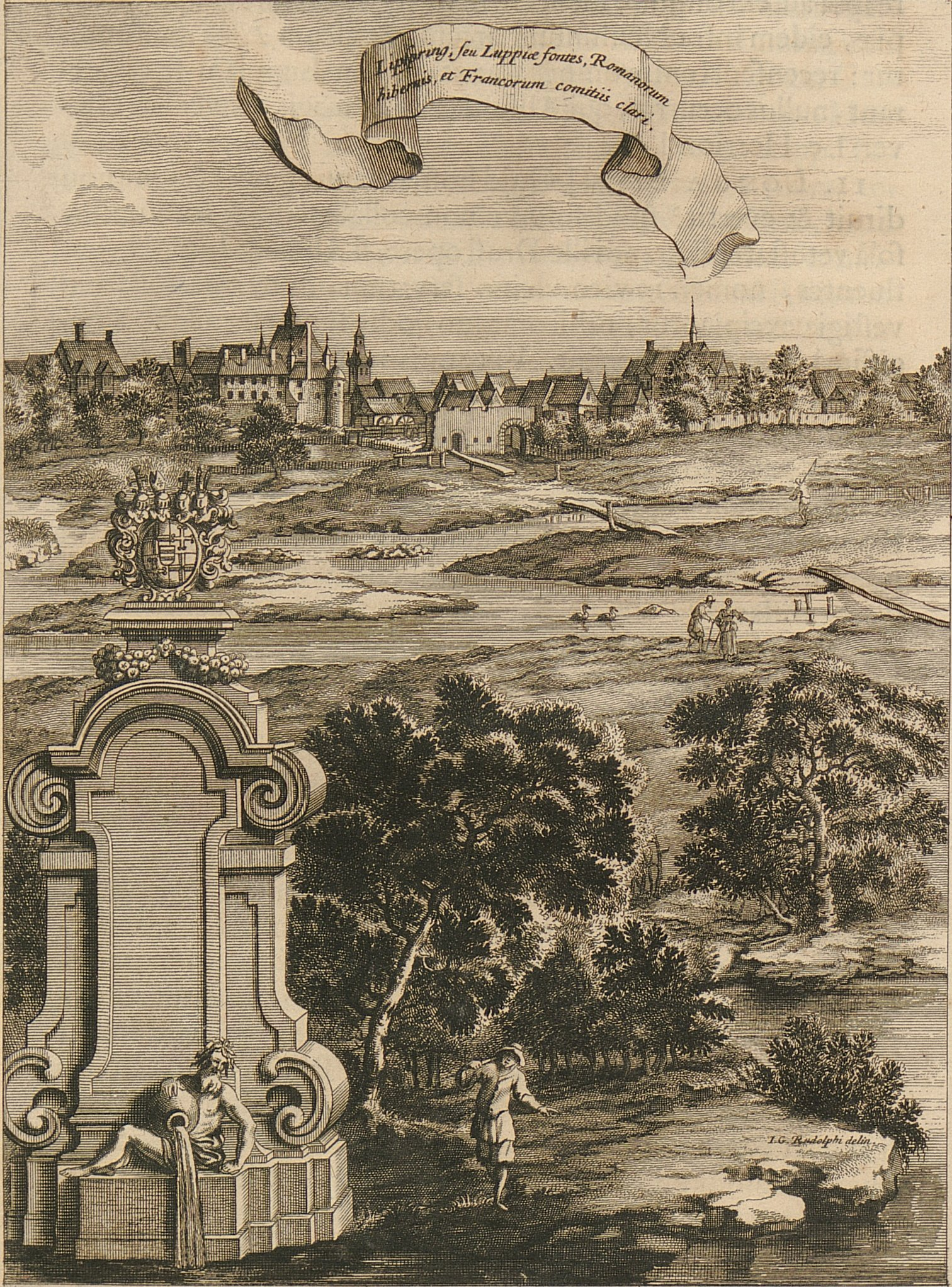 Lippspringe in der Monumenta Paderbornensia